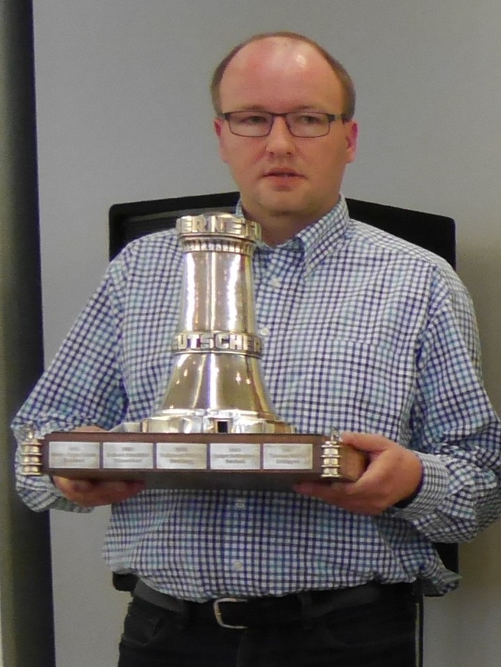 Sven Telljohann, Sieger des Dähne-Pokal 2016 in Halle an der Saale.